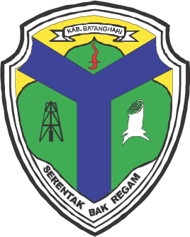 dari Batang Hari